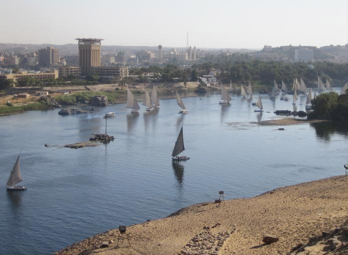 View from Kubbet Al-Hawa overlooking Aswan